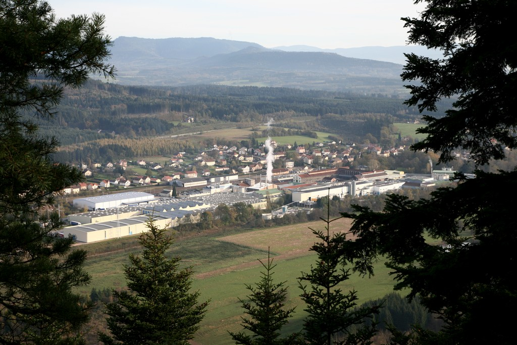 Photographie des Papeteries de Clairefontaine à Etival-Clairefontaine dans les Vosges (France).